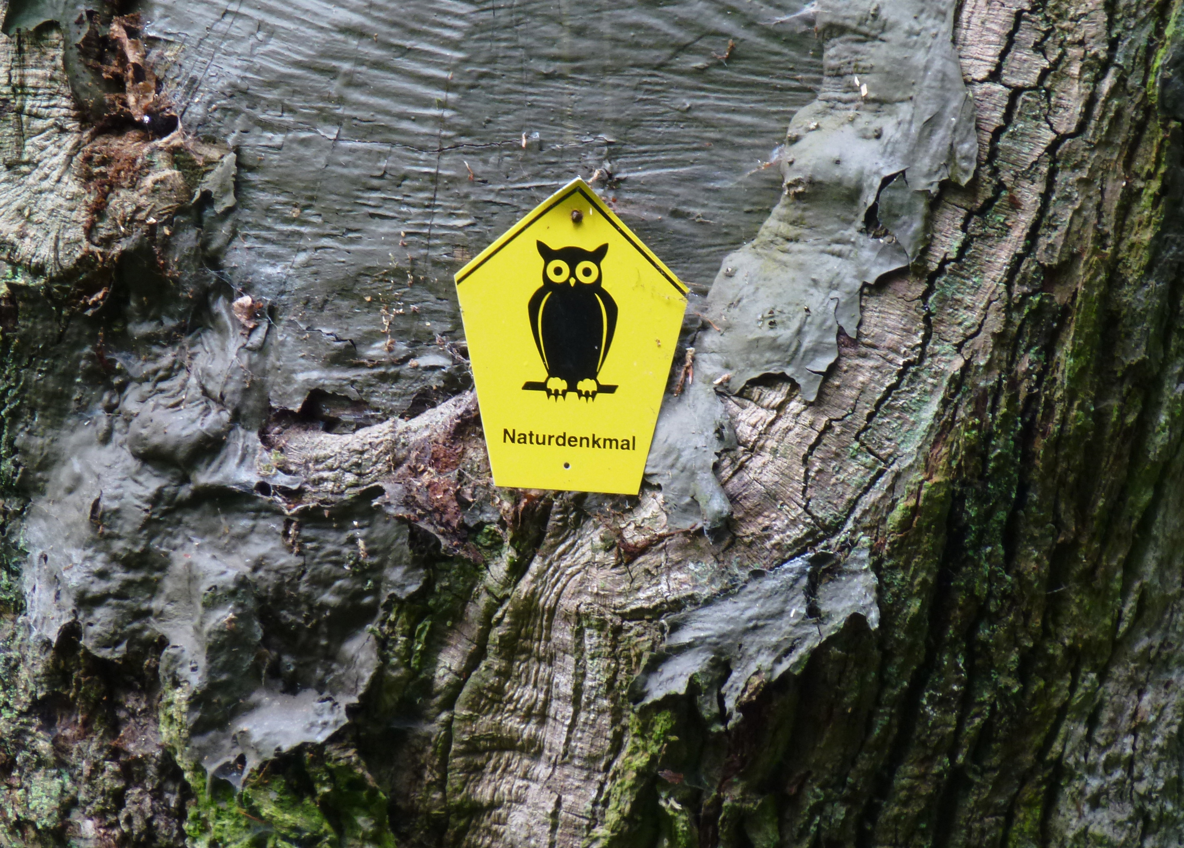 Die Bräutigamseiche im Dodauer Forst bei Eutin in Schleswig-Holstein.